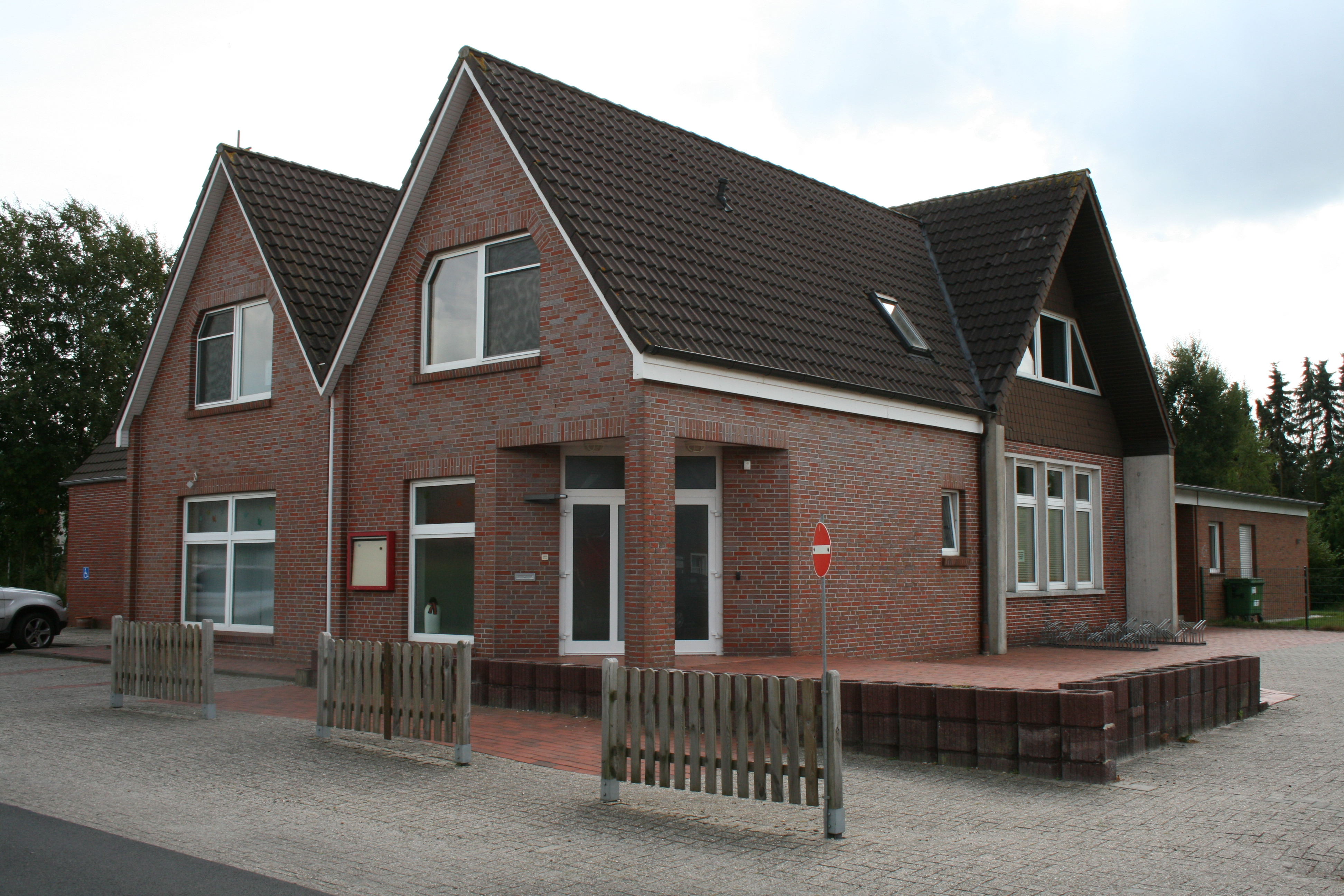 Das ehemalige Gebäude des Kindergartens Spatzennest in Veenhusen